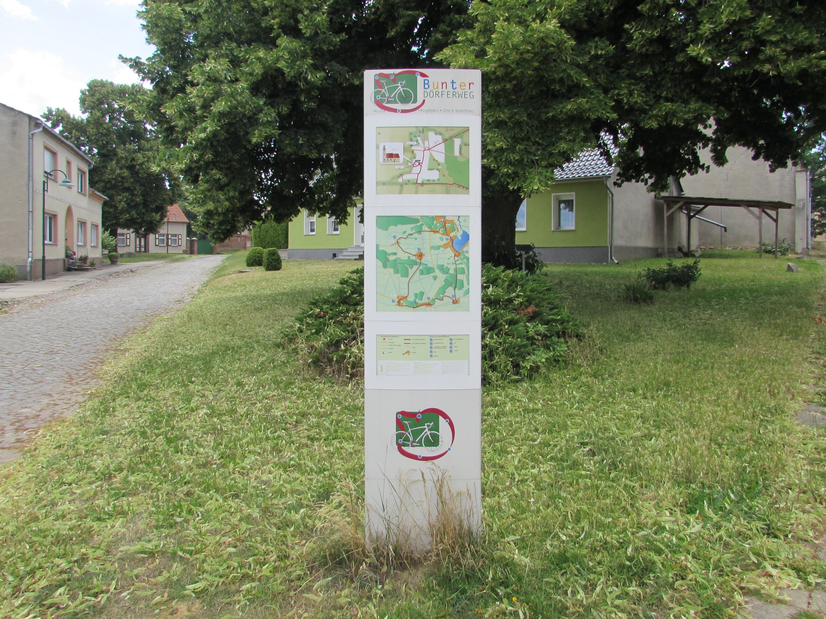 Infotafel Bunterdörferradweg in Zitz